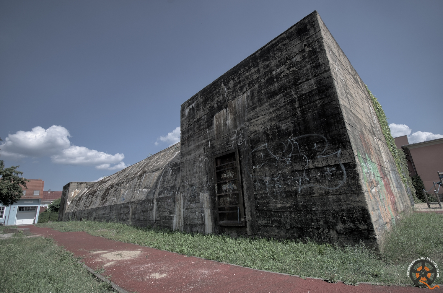 Hier die Außenansicht eines Bunkers in Salzgitter Bauart